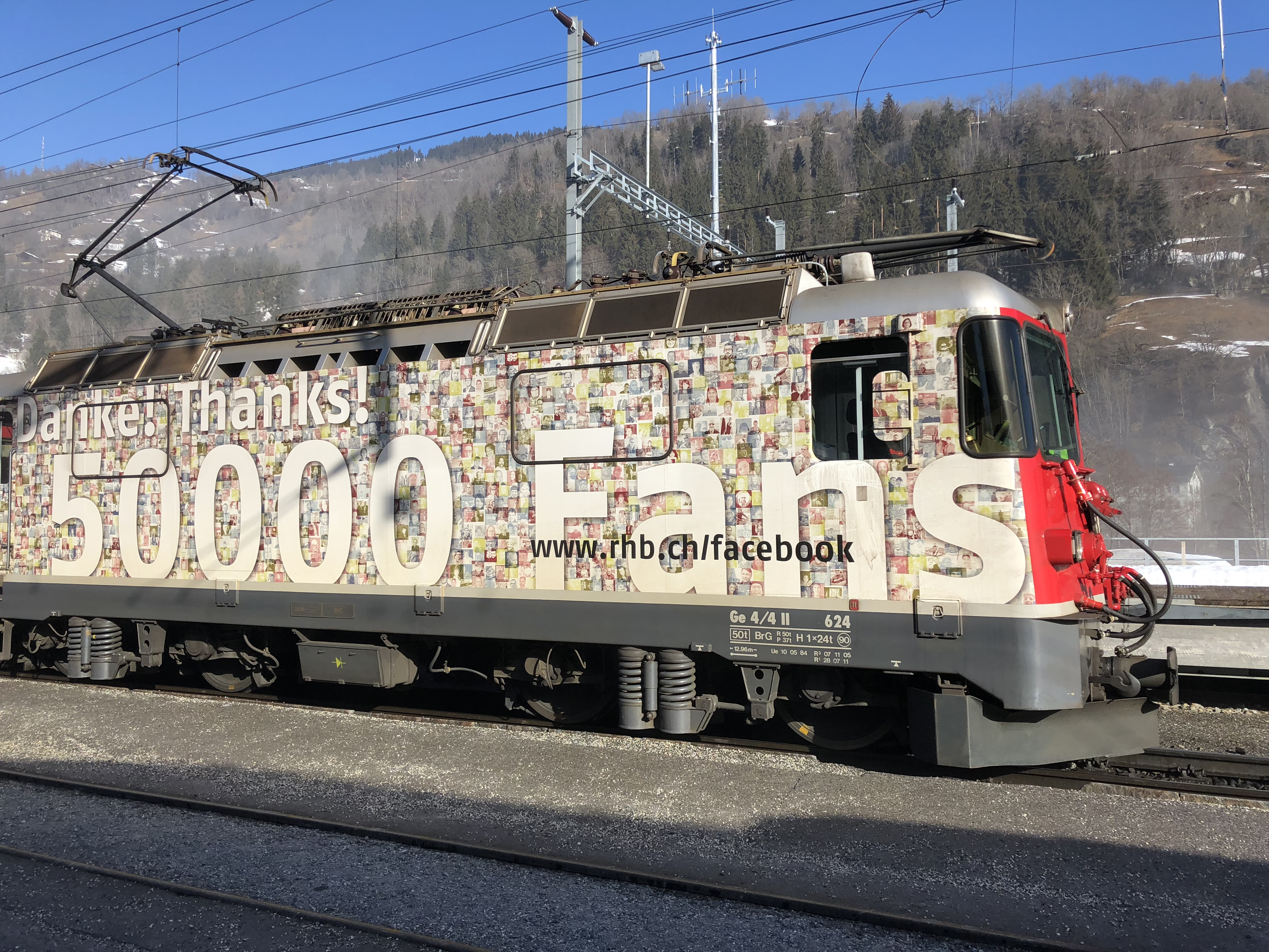 Facebbok Lokomotive der Rhätischen Bahn